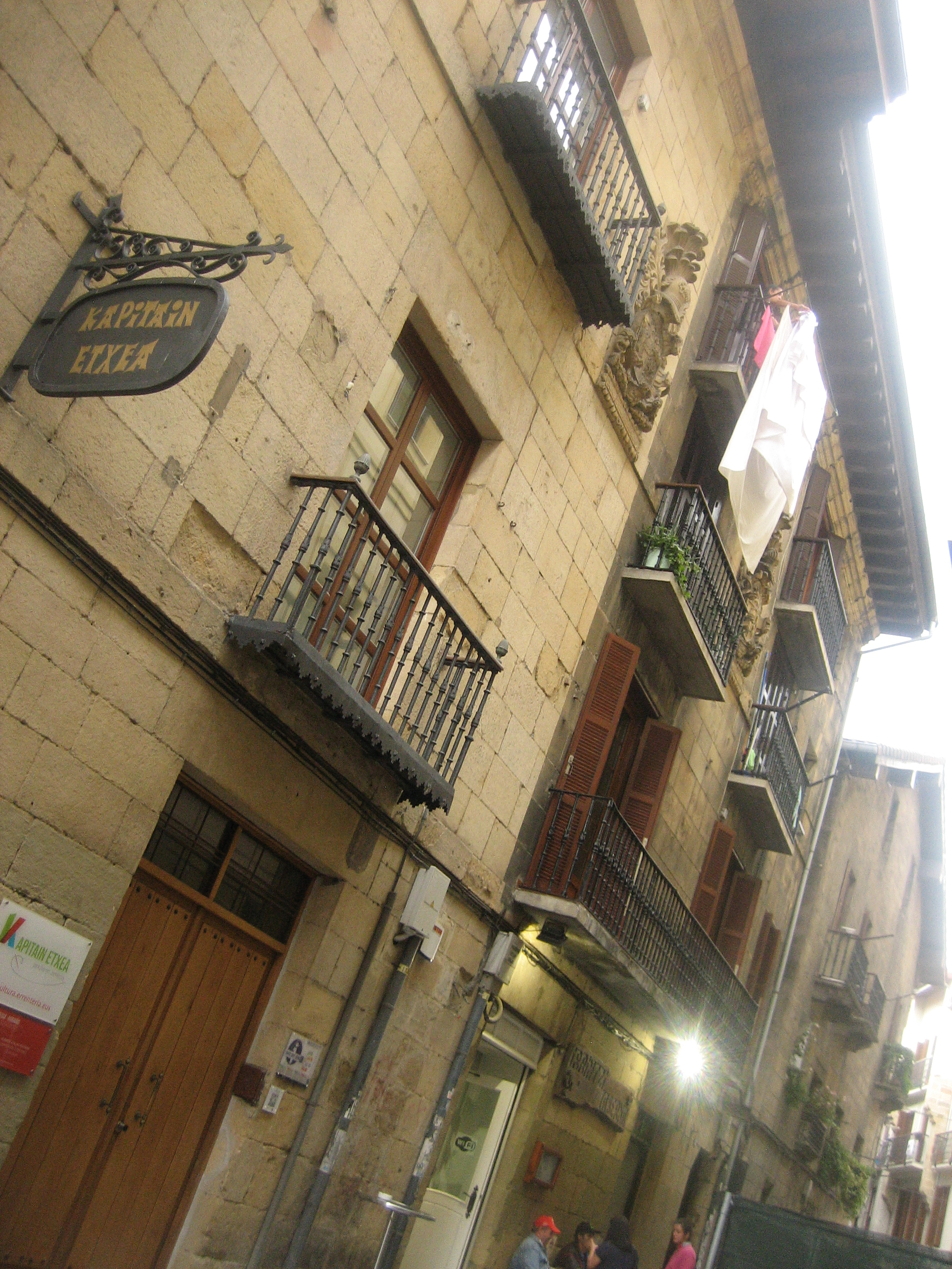 Kapitanenea kalea, 4-6, Errenteria